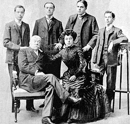 El ex presidente del Perú don Francisco García Calderón Landa y sus hijos. Año 1905.